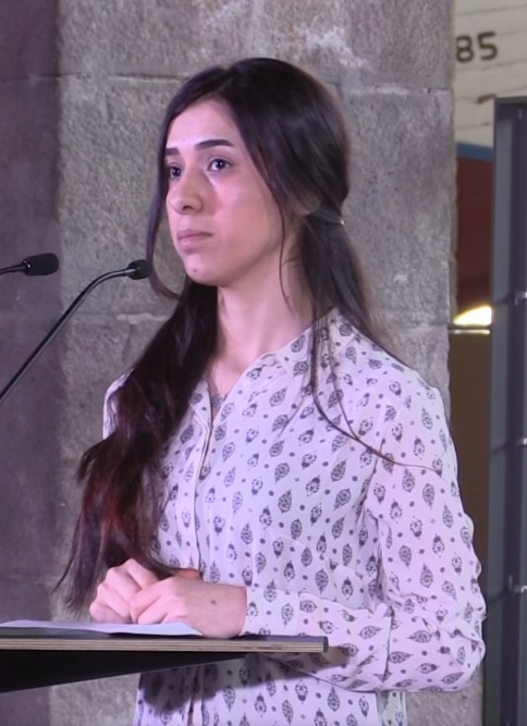 Nadia Murad